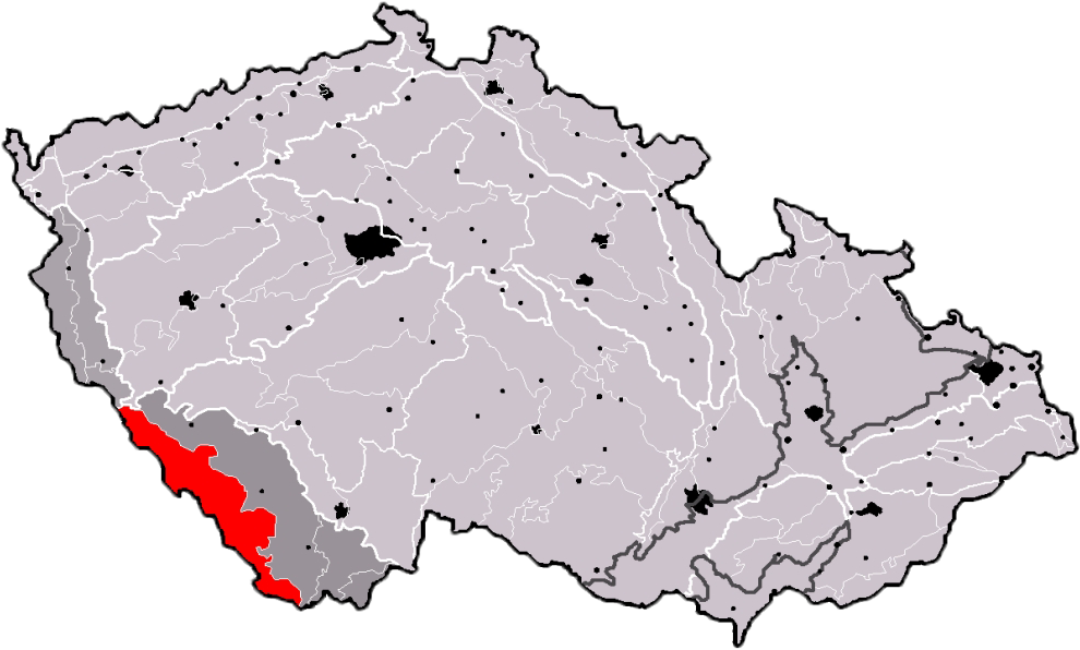 Poloha geomorfologického celku Šumava v rámci České republiky. Hercynský systém Hercynská pohoří I Česká vysočina I1 (I) Šumavská subprovincie I1B (IB) Šumavská hornatina I1B-1 (IB-1) Šumava